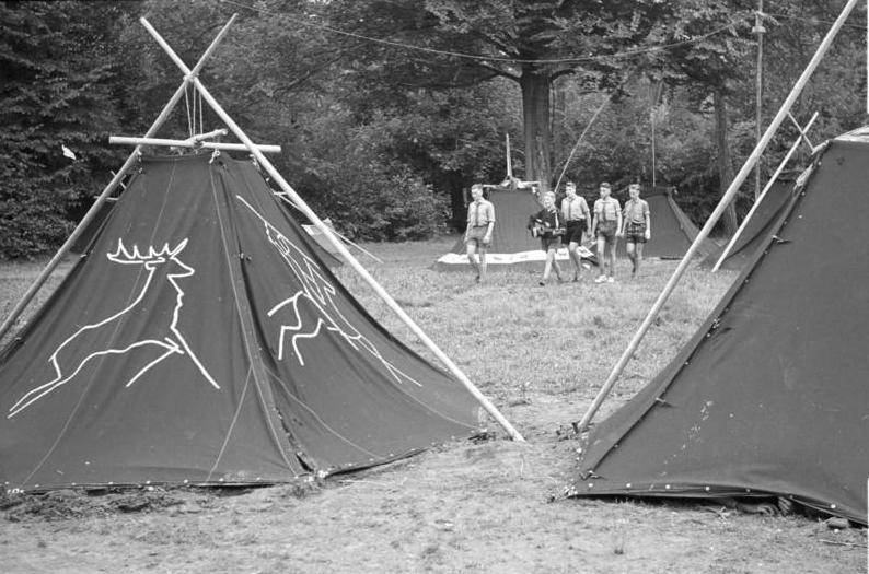 Christliche Pfadfinder im Donautal bei Friedingen Information added by Wikimedia users.